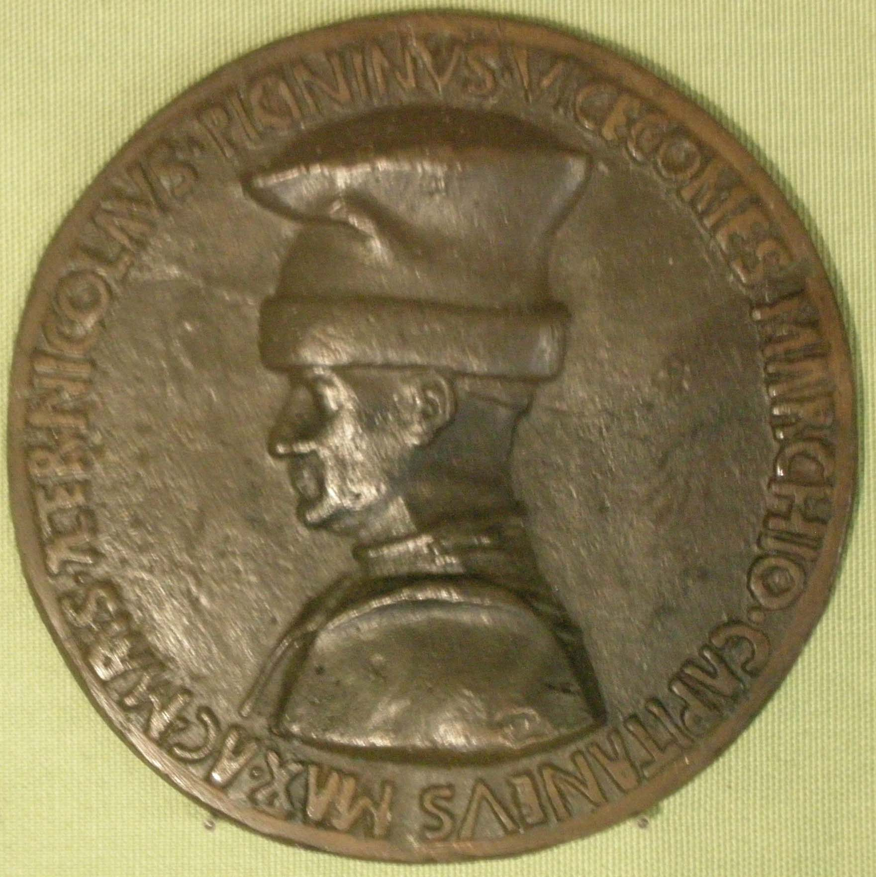 Medaglia di Niccolò Piccinino, 1439-1440